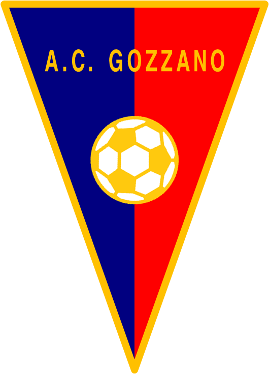 Logo AC GOZZANO 1979